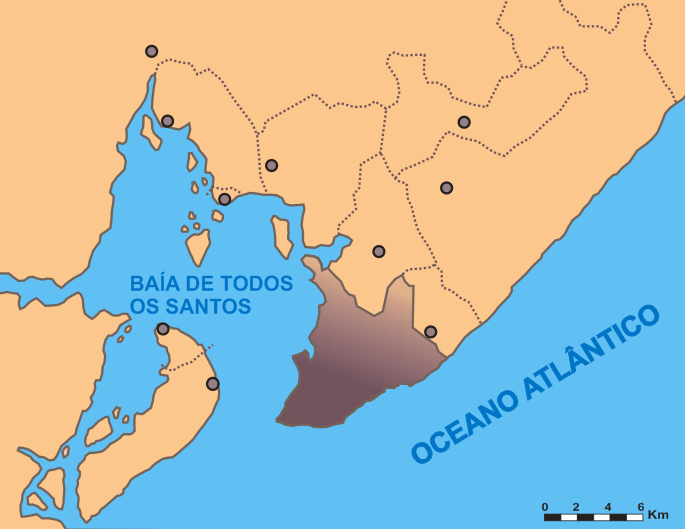 Baía de Todos os Santos (Bahia, Brazil)